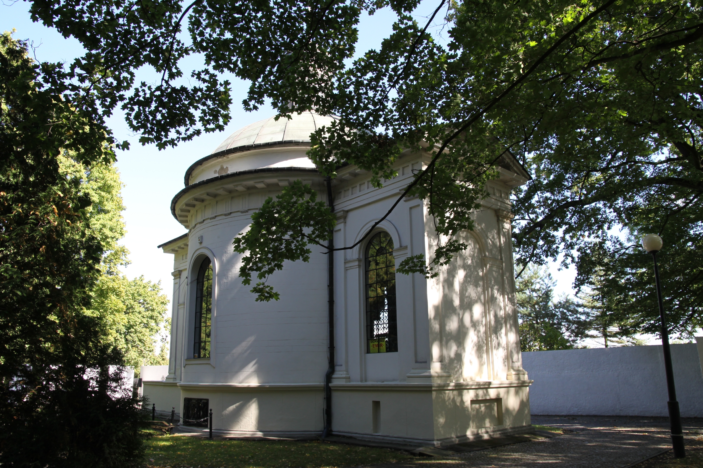 Kaplica, w zespole pałacowym, mur., 1 poł. XIX, Kutno